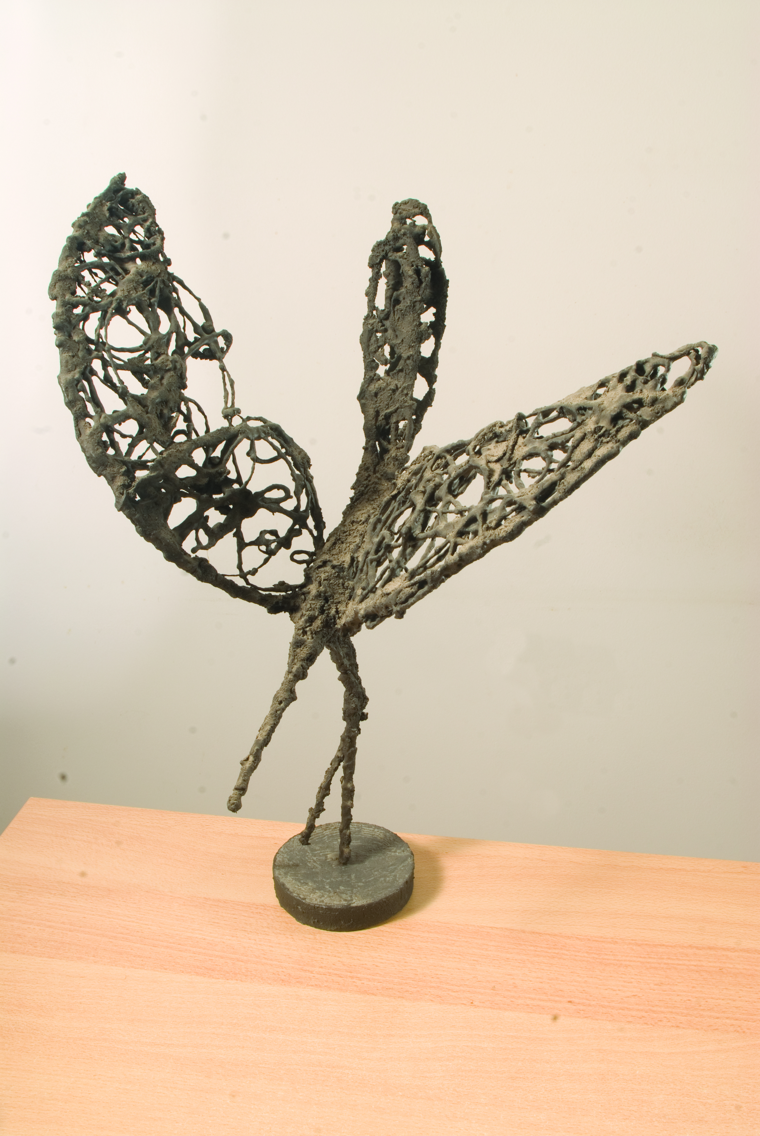 פסל ציפור